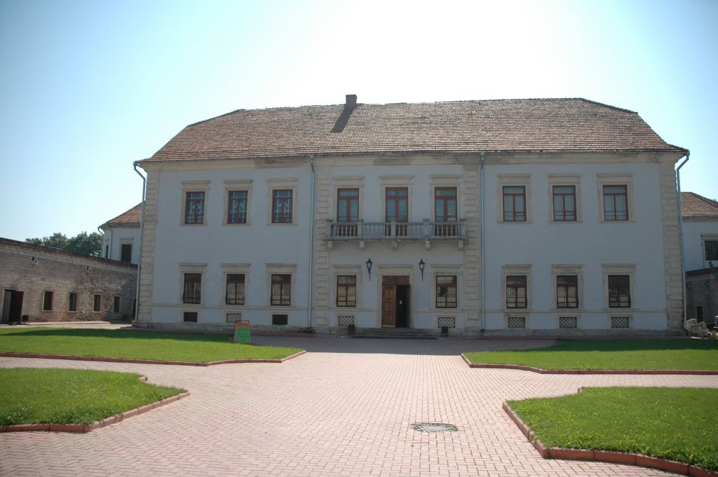 Ukraine, Zbarazh - castle.